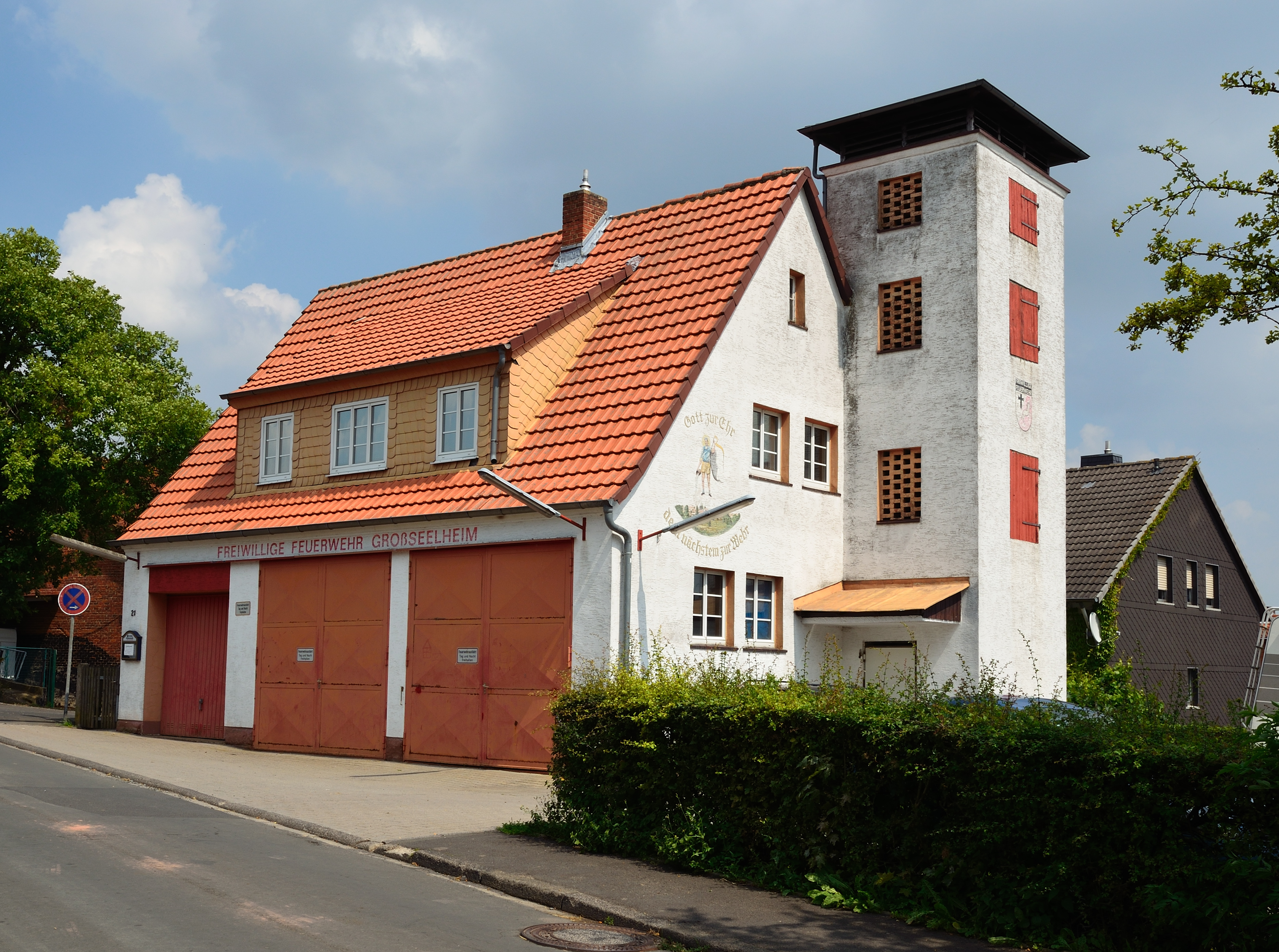 Freiwillige Feuerwehr Großseelheim